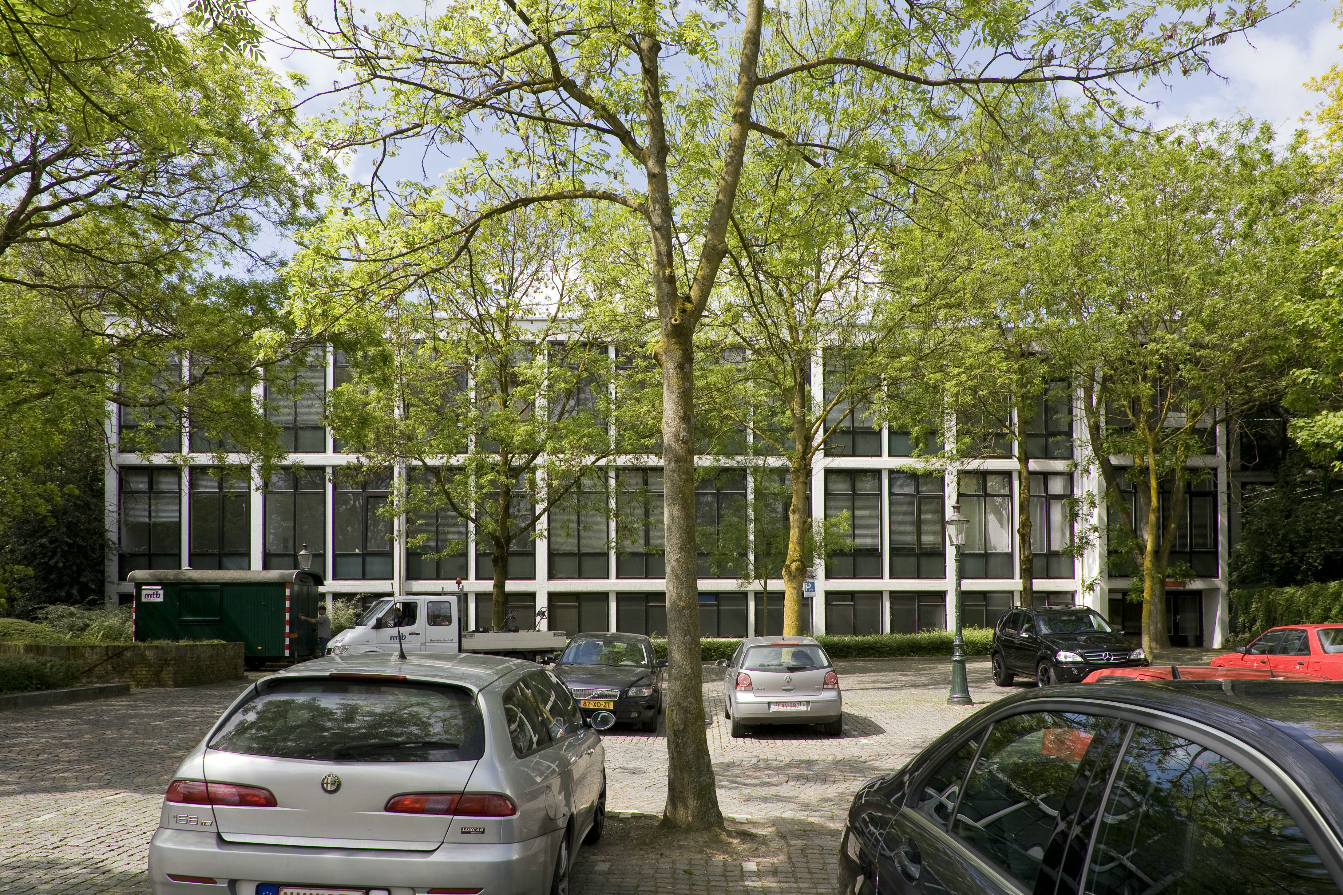 Jan Van Eyck Academie: Overzicht van de gevel gelegen aan parkeerplaats